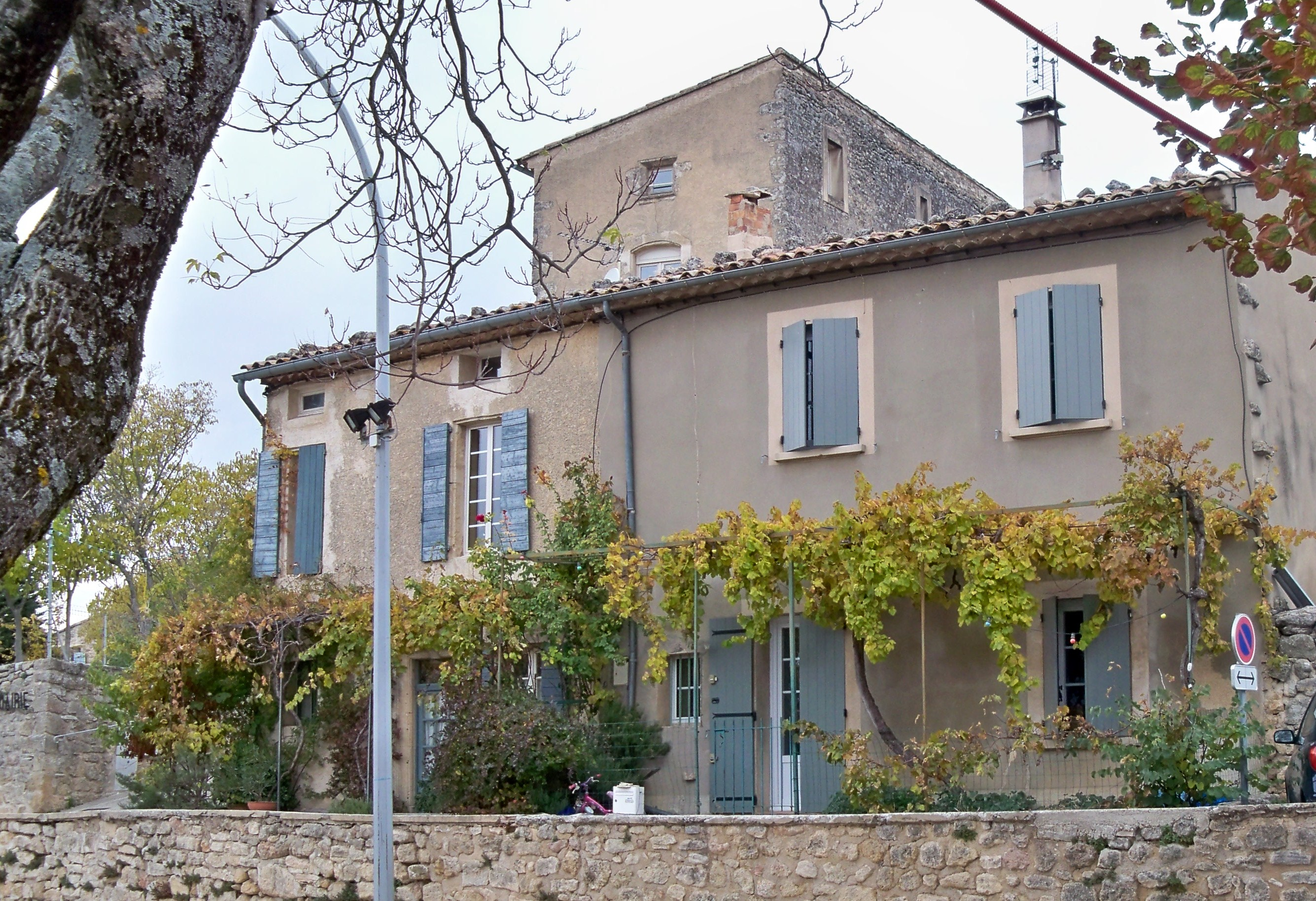 treille à Viens, Vaucluse, France